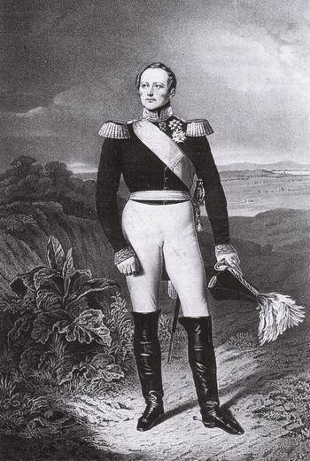 Großherzog Leopold I. von Baden.